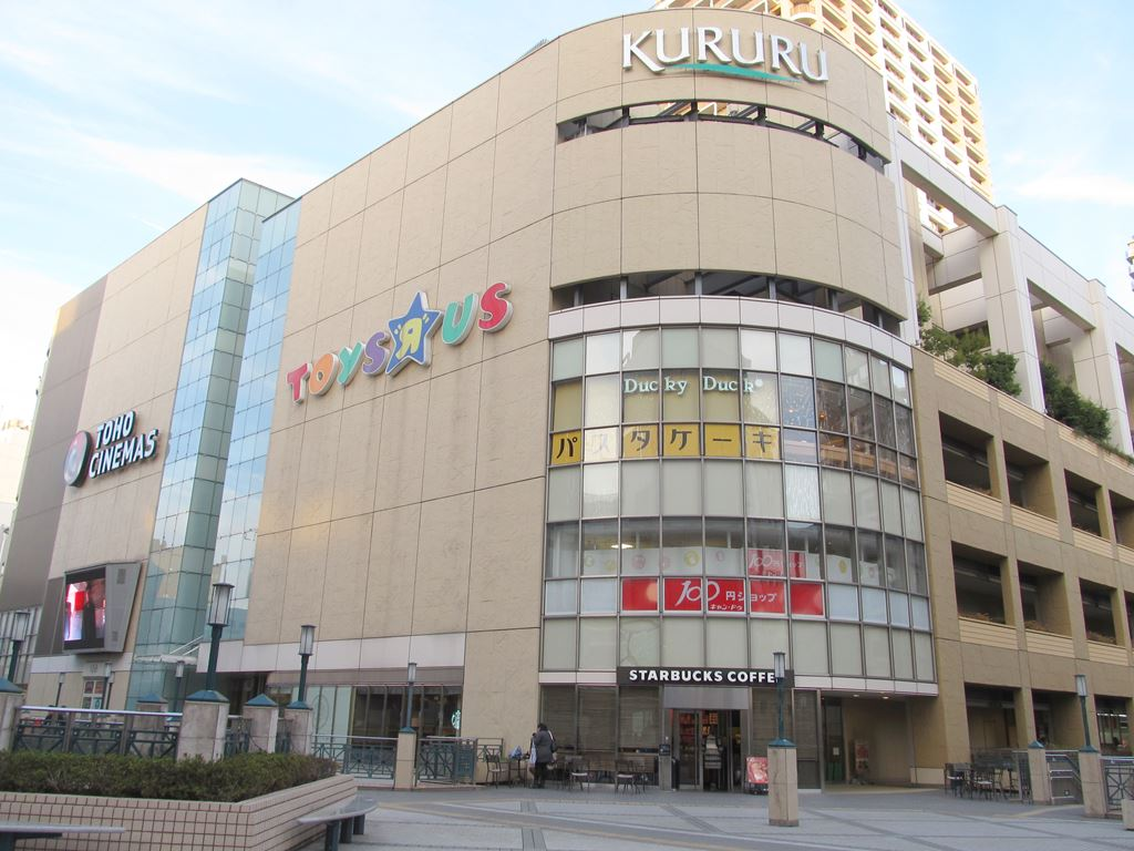 くるる（kururu） グランタワー府中ラ・アヴェニュー TOHOシネマズ トイザらス